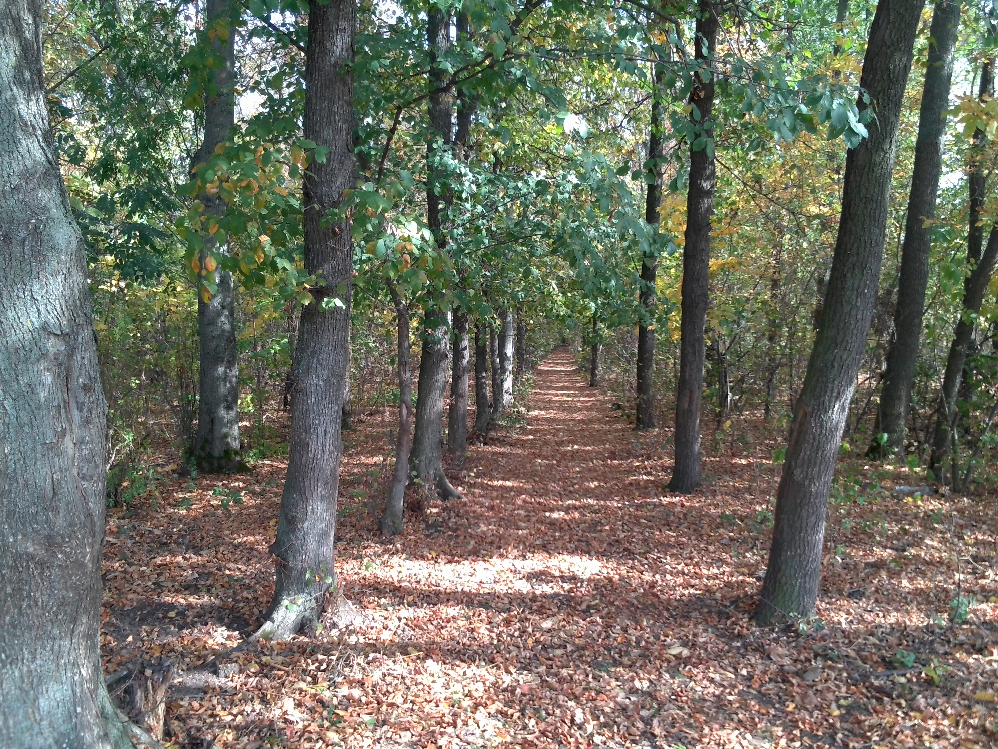 ст. Нова Гребля